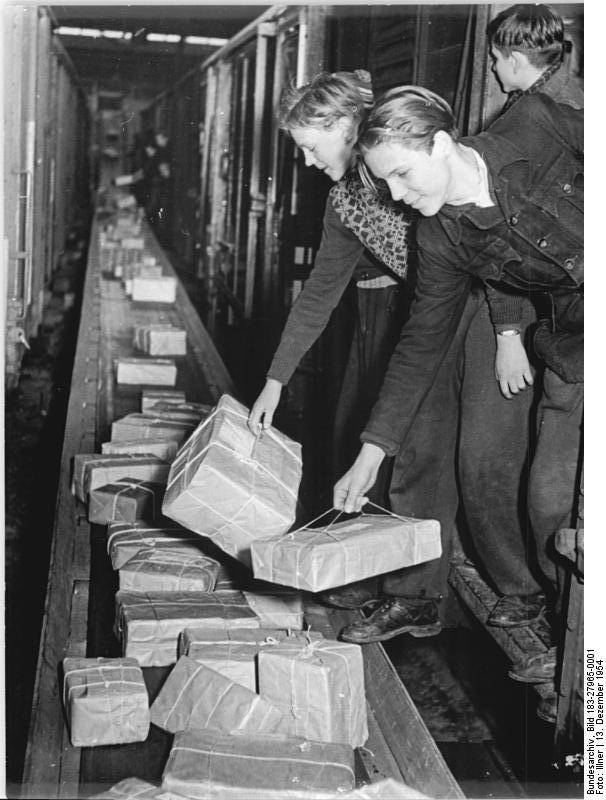 Zentralbild Illner 5Mot.13.12.1954 Weihnachtlicher Hochbetrieb beim Paketpostamt Leipzig N 18 Das Paketpostamt, Leipzig N 18, hat einem täglichen Umschlag von weit mehr als 100.000 Paketen und über 60.000 Päckchen in diesem Jahr den stärksten Weihnachtsverkehr der Nachkriegszeit. UBz: Förderanlagen und Transportbänder laufen auf den Bahnsteigen entlang und befördern die Pakete direkt aus den Waggons zur Beschreibestelle. Viele Aushilfskräfte werden täglich gebraucht, um die Waggons zu entladen.